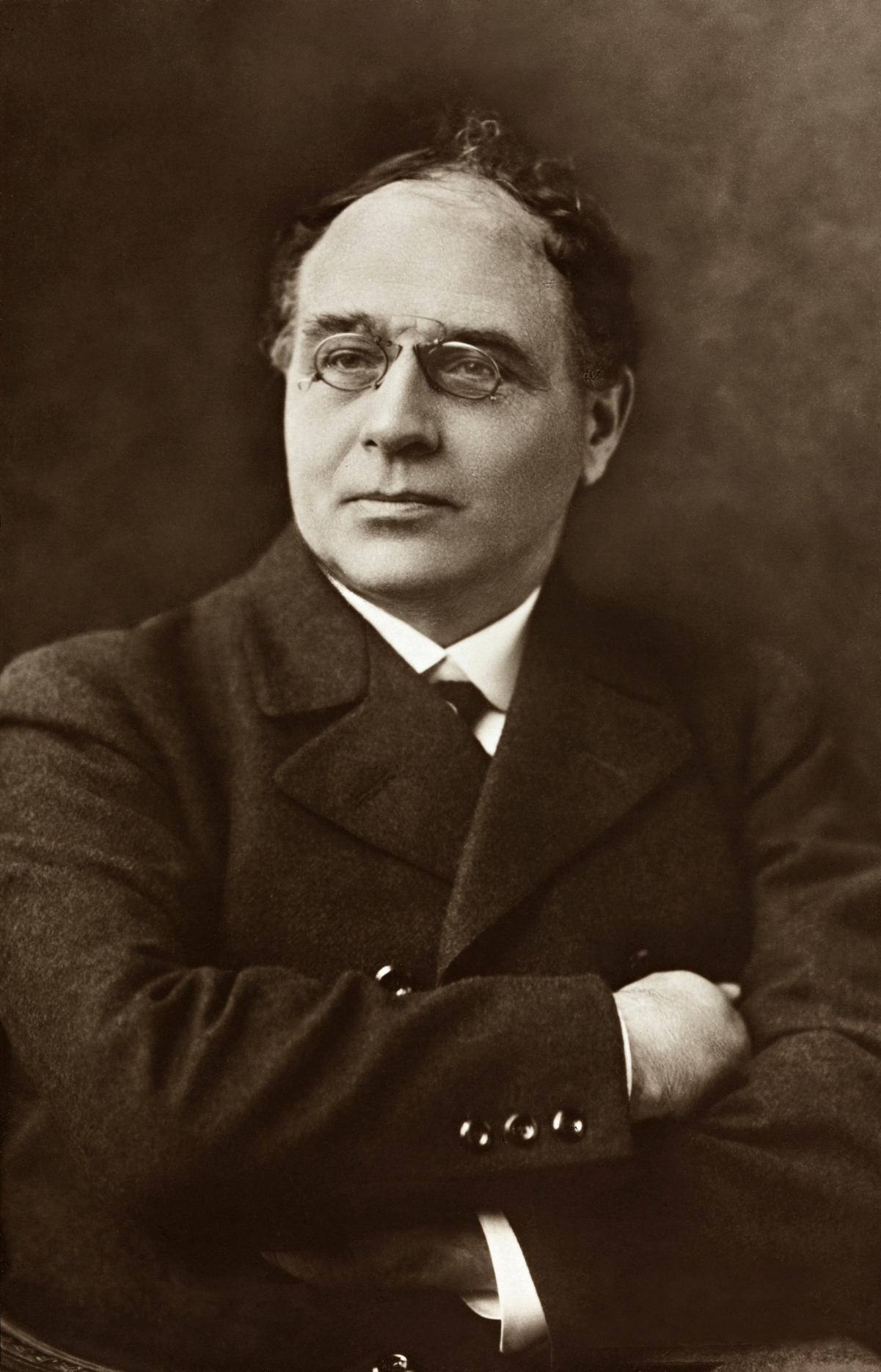 Tittel / Title: Hans E. Kinck Motiv / Motif: Postkort. Postkortet stammer fra Gyldendals historiske portrettarkiv. Dato / Date: ukjent / unknown Fotograf / Photographer: ukjent / unknown Utgiver / Publisher: Mittet & Co. Eier / Owner Institution: Nasjonalbiblioteket / National Library of Norway Lenke / Link: Bildesignatur / Image Number: blds_04884